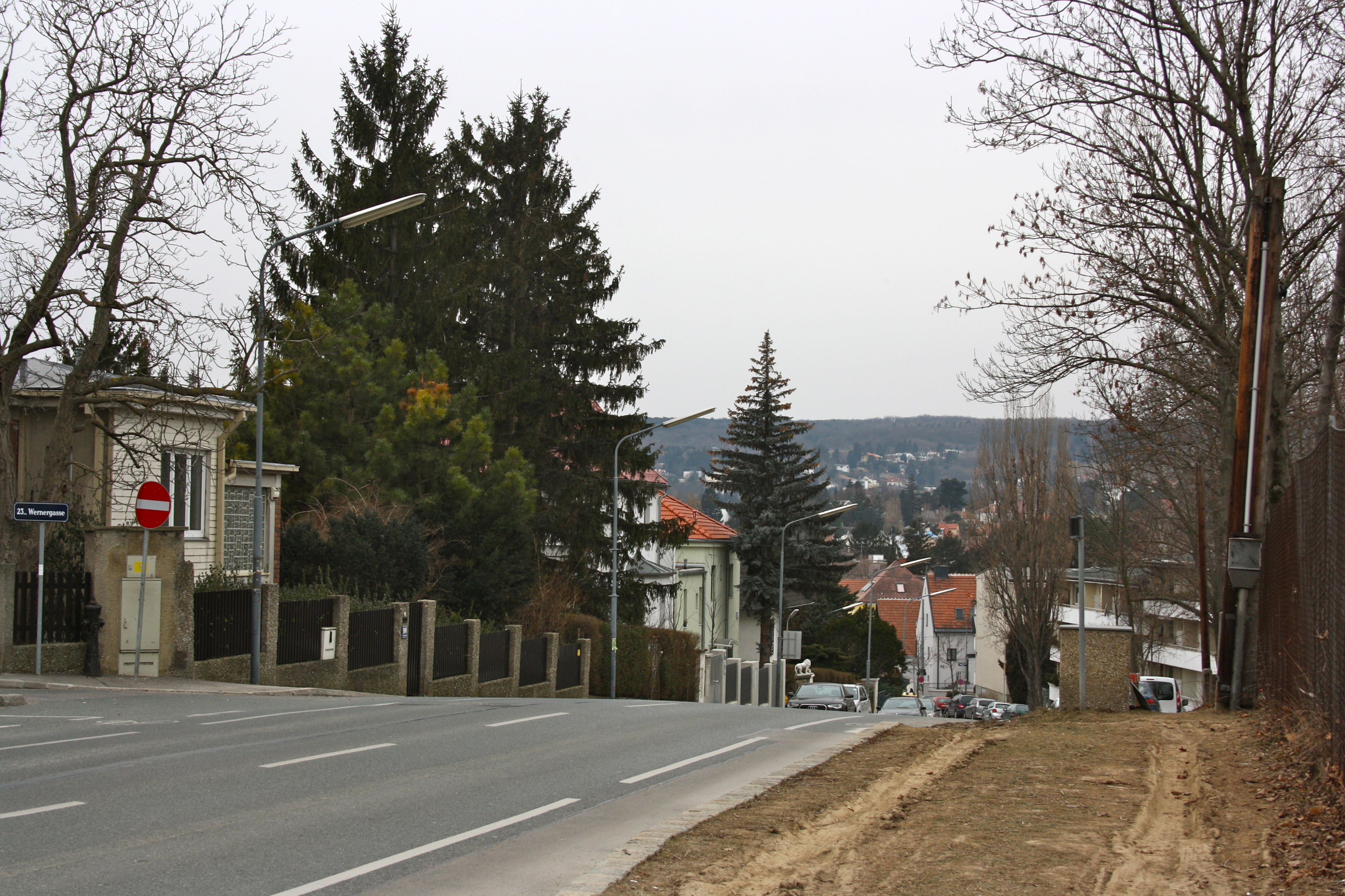 Rosenhügelstraße in Wien-Mauer, Ecke Wernergasse, Blick Richtung Süden.